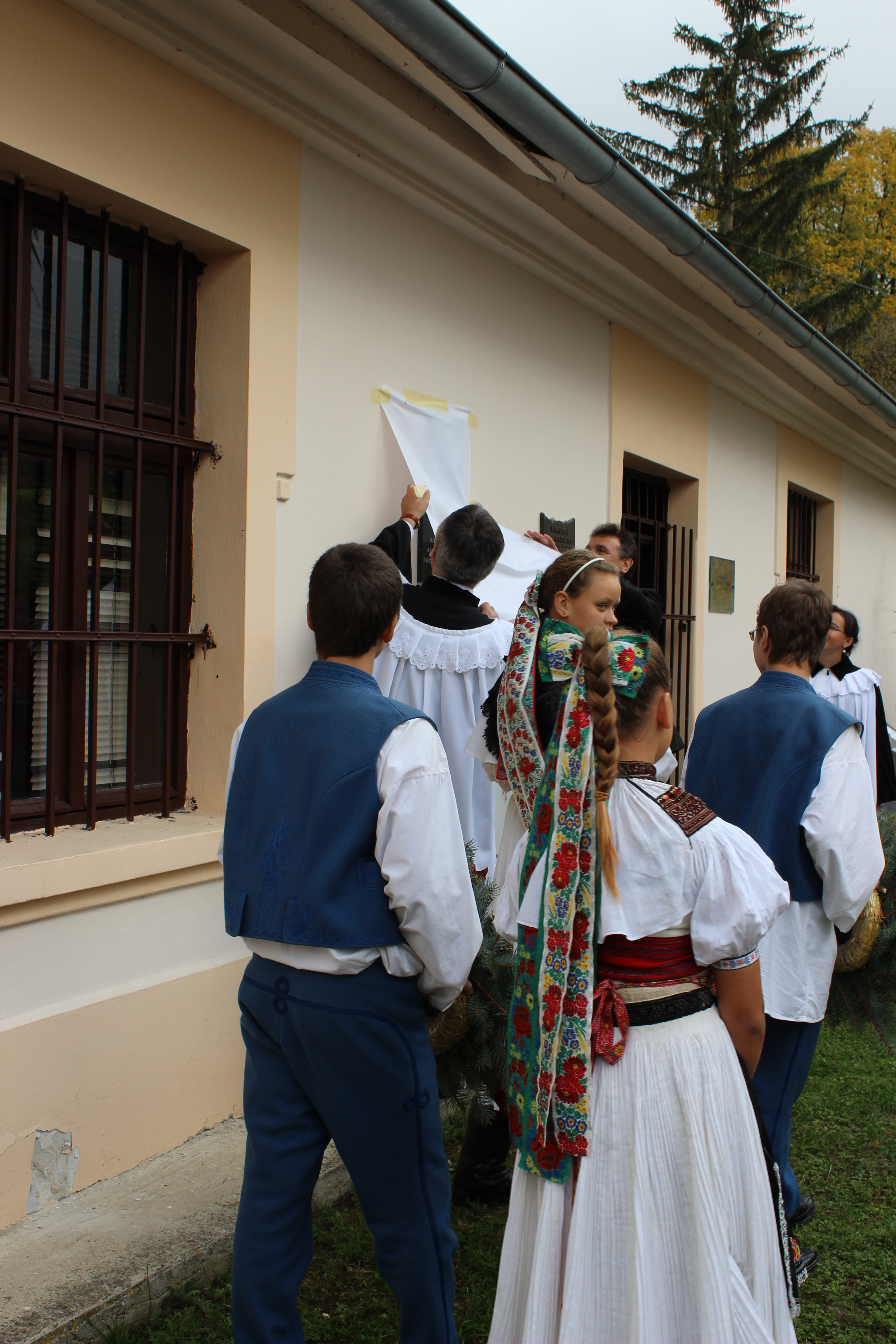 Odhalení pamětní desky Cyrila Holubyho na památné zemianskopodhradské faře během Riznerových a Holubyho oslav v Zemianskom Podhradie. Odhalení provádí generální biskup ECAV Miloš Klátik a slovenský poslanec Dušan Bublavý.